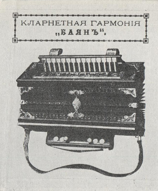 Кларнетная гармония "Баян".